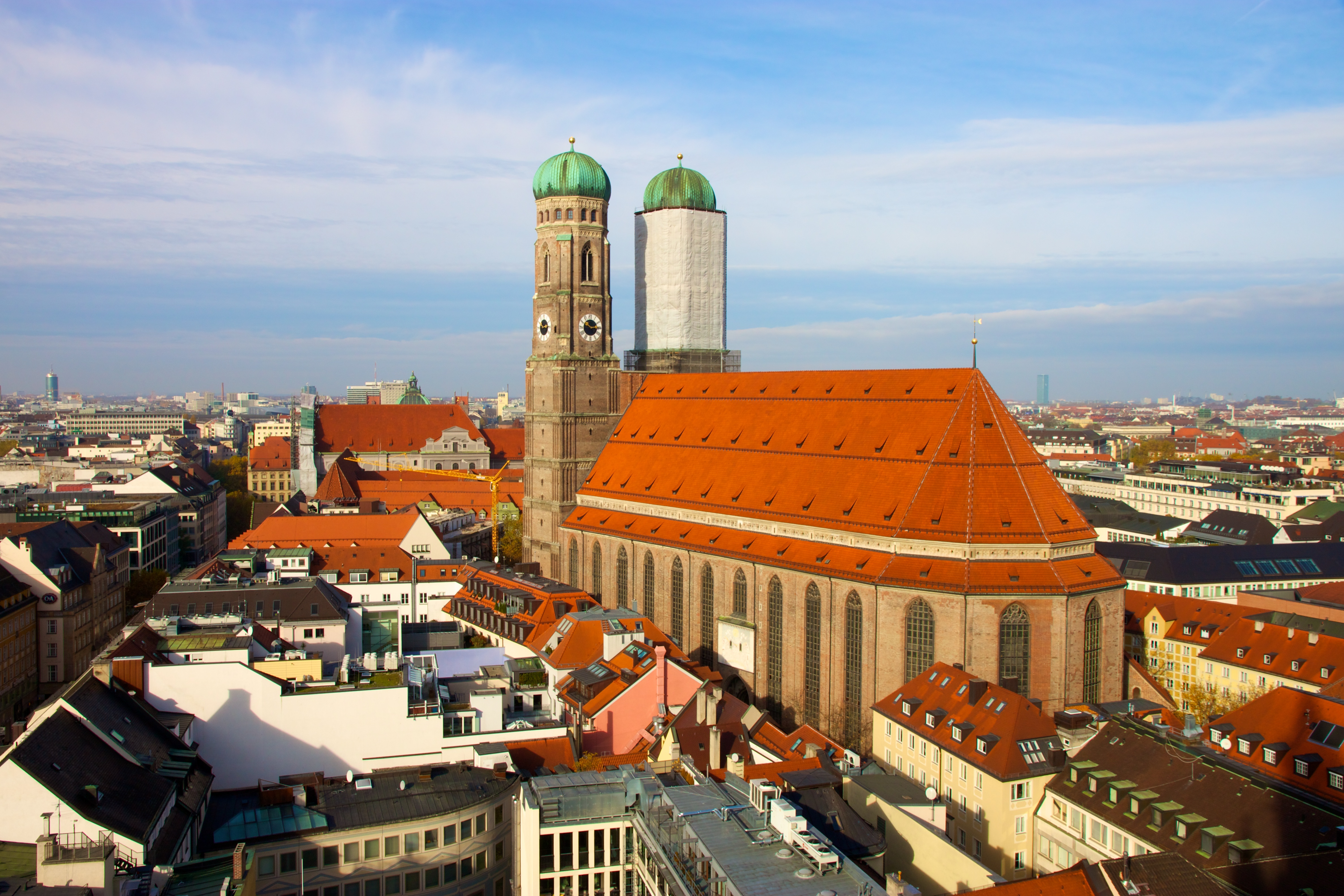 Munich Frauenkirche from Neues Rathaus